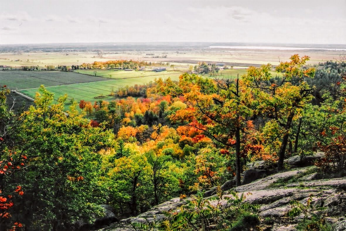 A view of a portion of the municipality of Pontiac from Luskville Falls in the Gatineau Hills in western Québec, Canada. The view is to the Southwest; in the background the Ottawa River is visible, and beyond that Eastern Ontario. Une portion de la municipalité de Pontiac, vue des Chutes Luskville dans les Collines de Gatineau, dans le ouest du Québec, Canada. La direction est sud-ouest; la rivière des Outaouais est visible dans l'arrière-plan, et plus loin, l'est de l'Ontario.